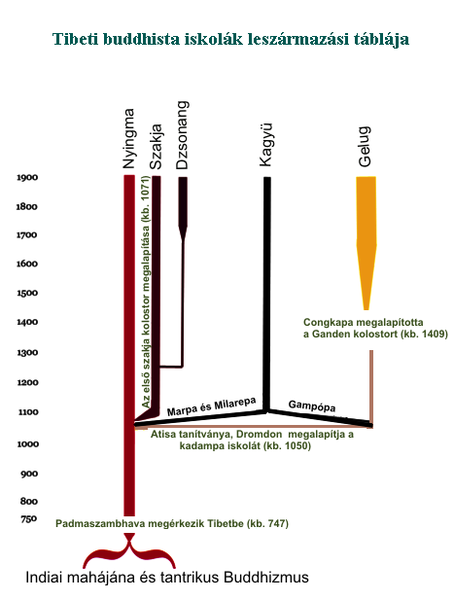 Tibeti buddhista iskolák leszármaztatási táblája